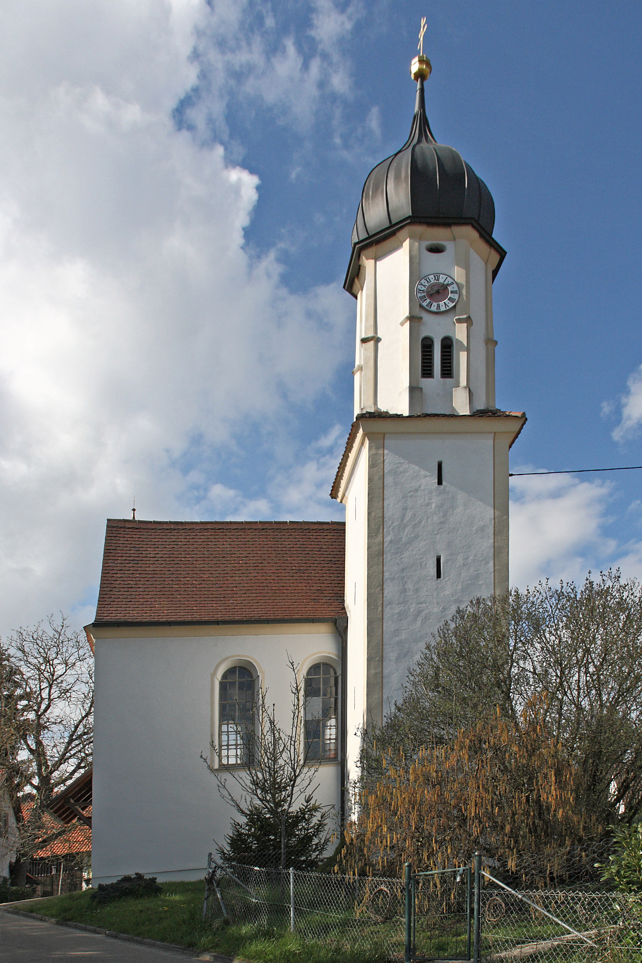 Hohenraunau, Ortsteil von Krumbach; Südansicht der Herz-Jesu-Kapelle